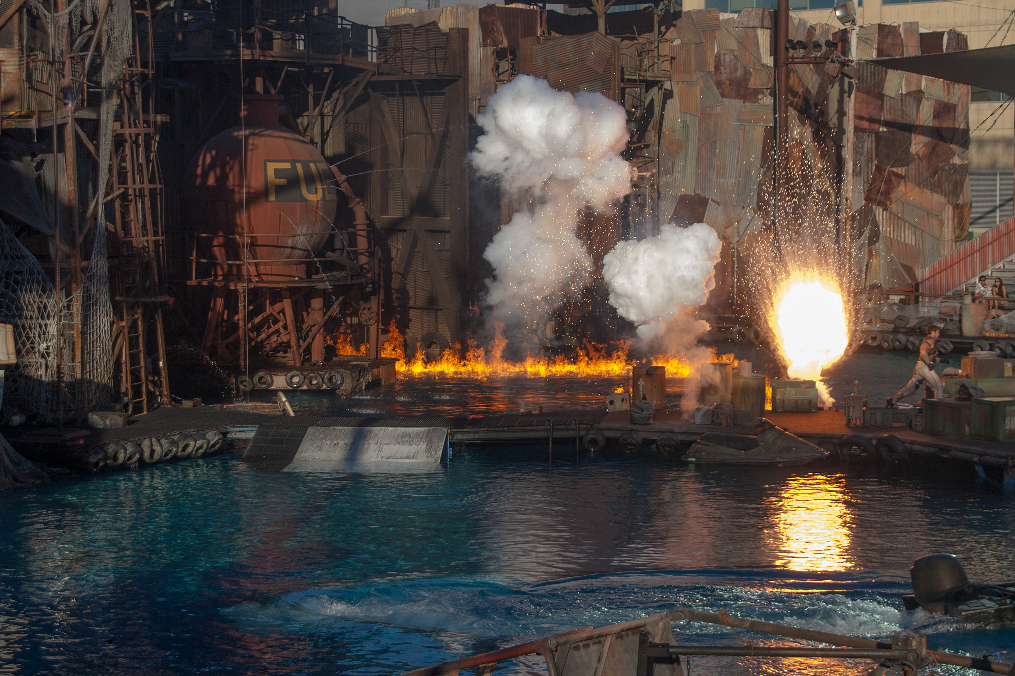 diese Show kommt dem Originalfilm sehr nahe ...lohnt sich auf alle Fälle Kalifornien/ USA